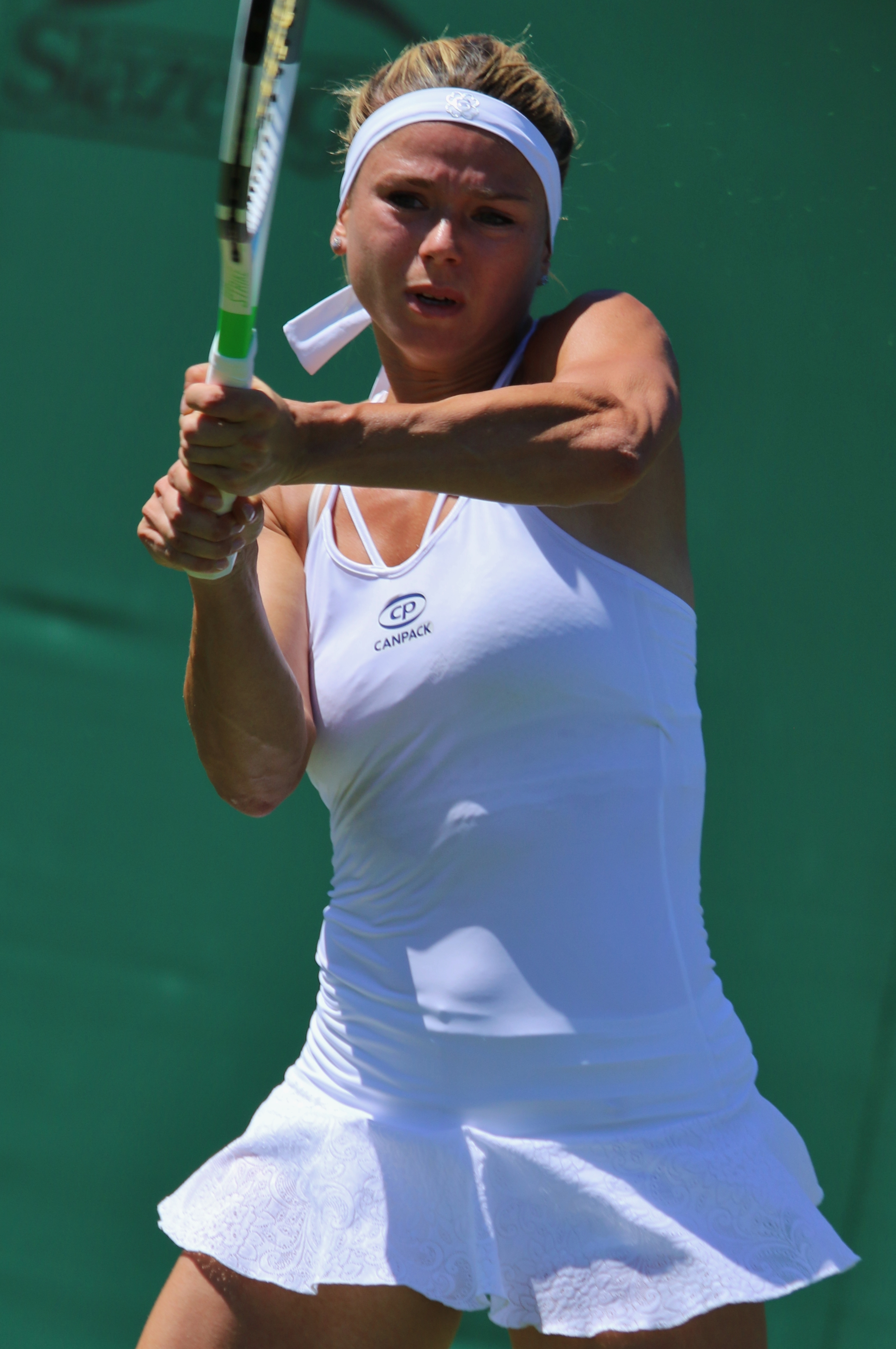 Giorgi WM18 (18)